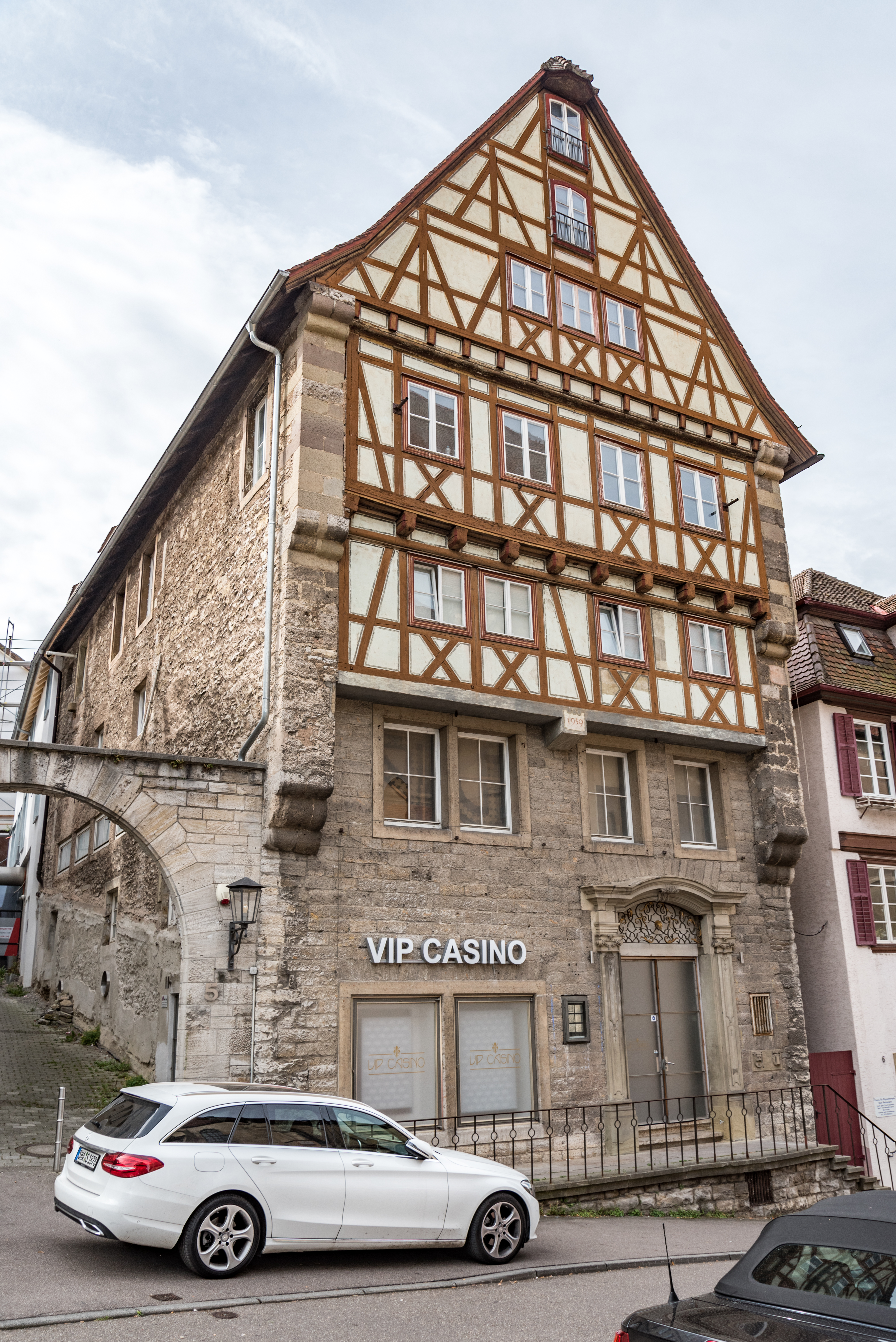 Schwäbisch Hall, Klosterstraße 5